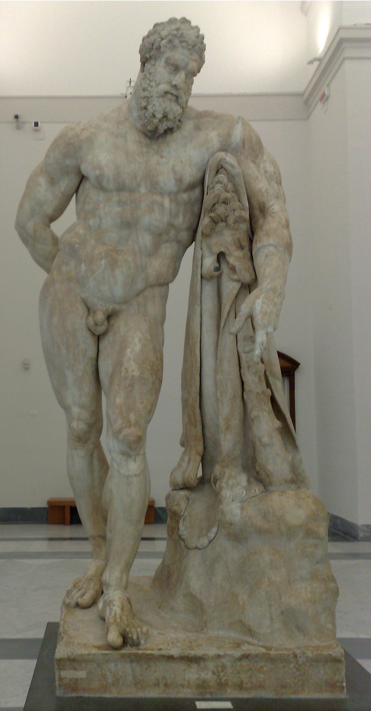 Ercole Farnese (Museo Archeologico Nazionale di Napoli)